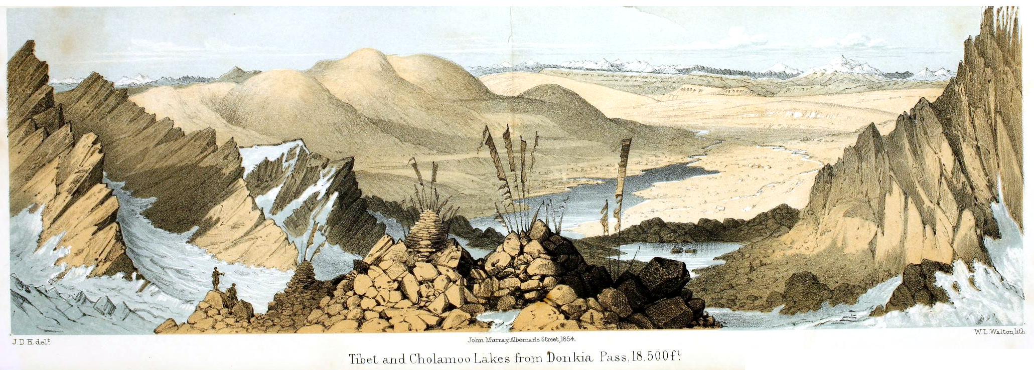 Donkia pass